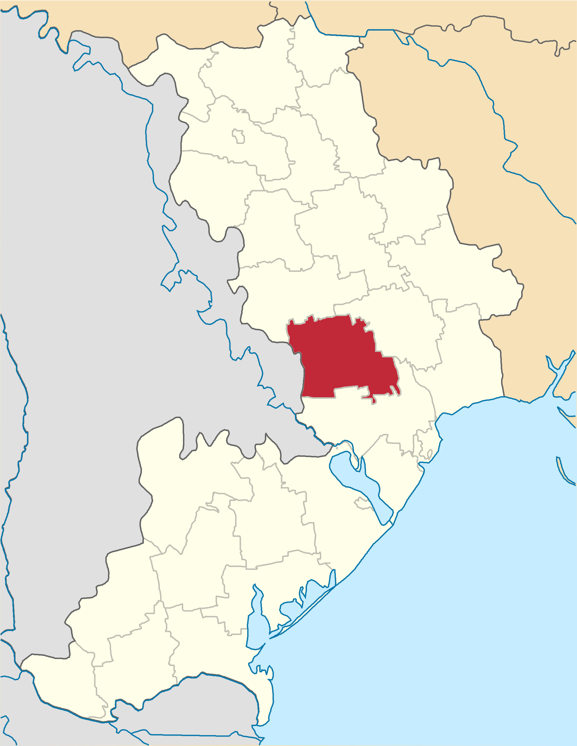 Rozdilnenskyi-Raion map